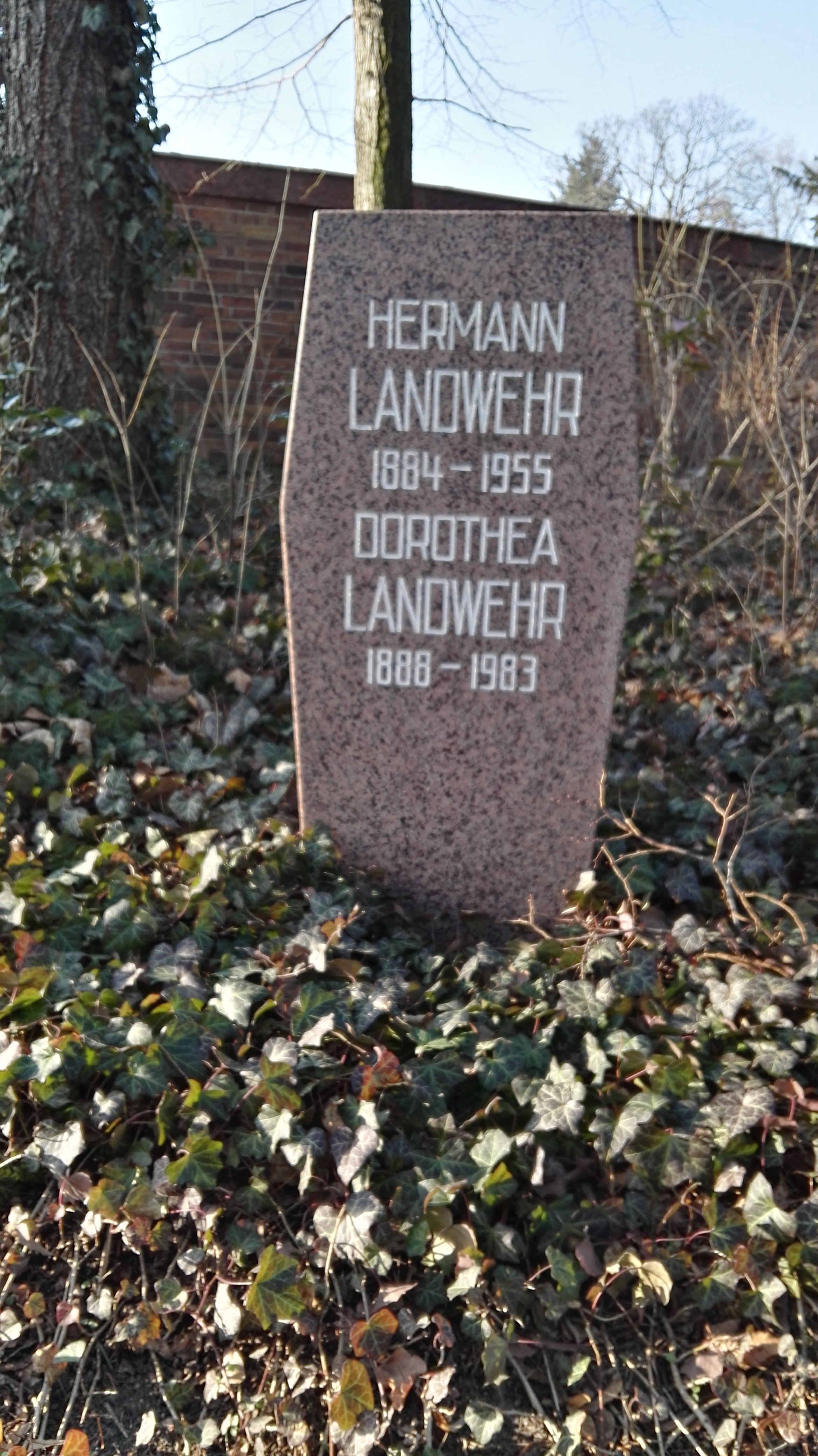 Grab von Hermann Landwehr und Dorothea Landwehr in der Grabanlage Pergolenweg auf dem Sozialistenfriedhof des Zentralfriedhofs Friedrichsfelde